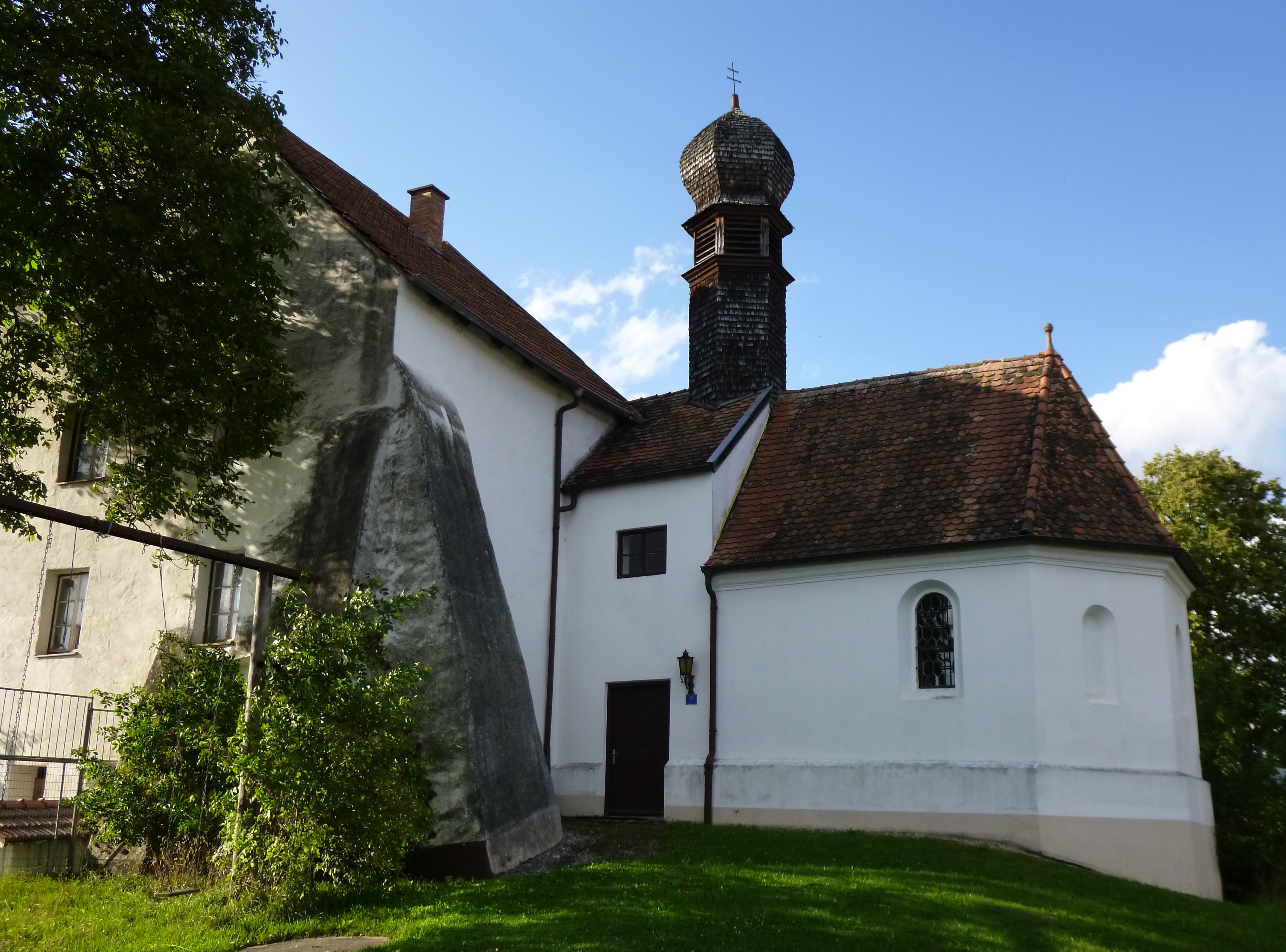 Die katholische Schlosskapelle St. Valentin ist an das ehemalige Wasserschloss angebaut. Sie ist im Kern spätgotisch, barockisiert mit Ausstattung. Sie liegt in der kleinen Ortschaft Au vorm Wald 44, nahe Hunderdorf. Liste der Baudenkmäler in Hunderdorf.